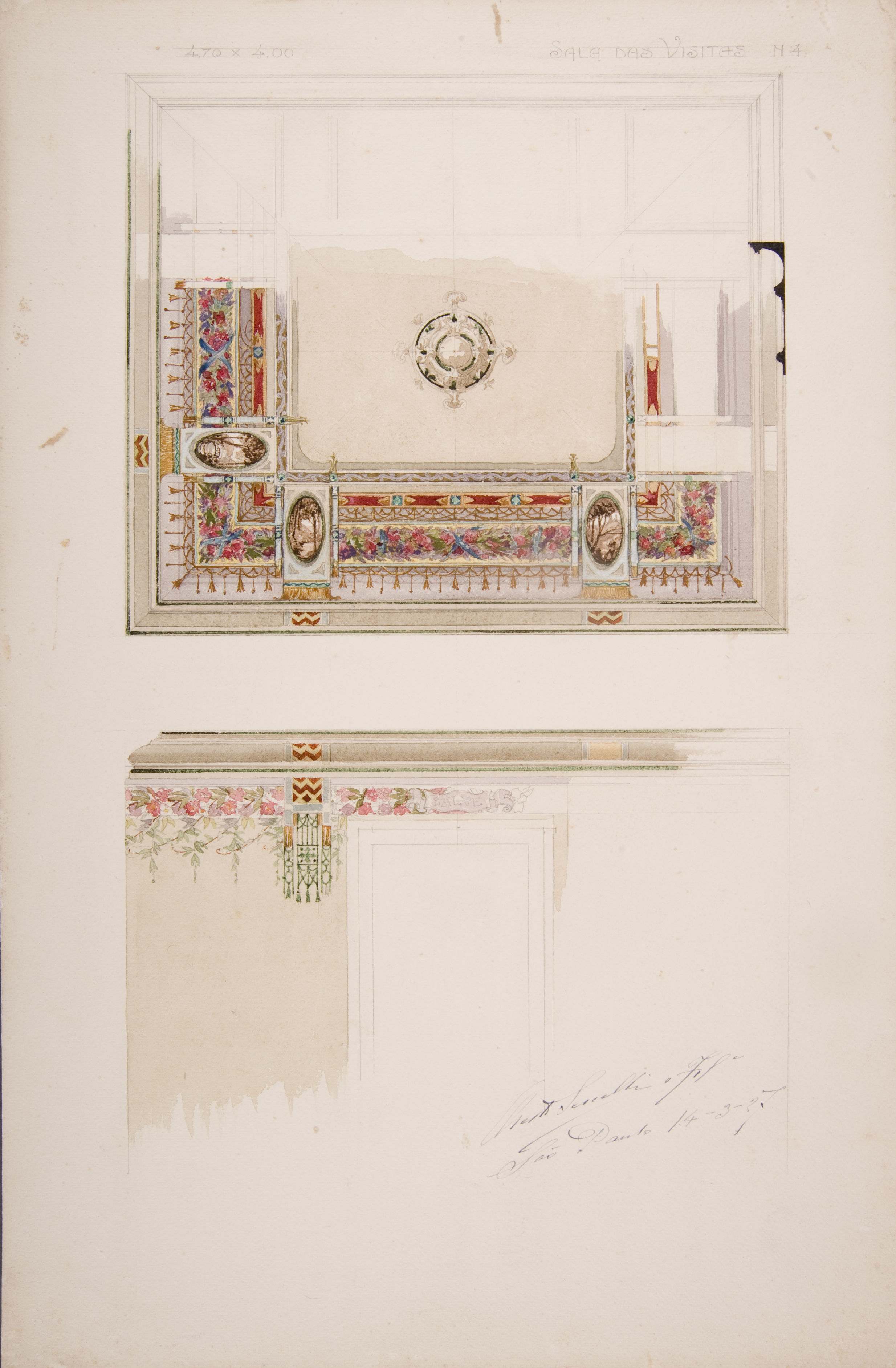 Obra que integra o acervo do Museu Paulista da USP.